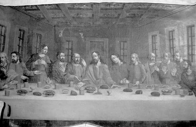 Апошняя Вячэра. Пачатак XIХ ст., в. Касута, Вілейскі р-н